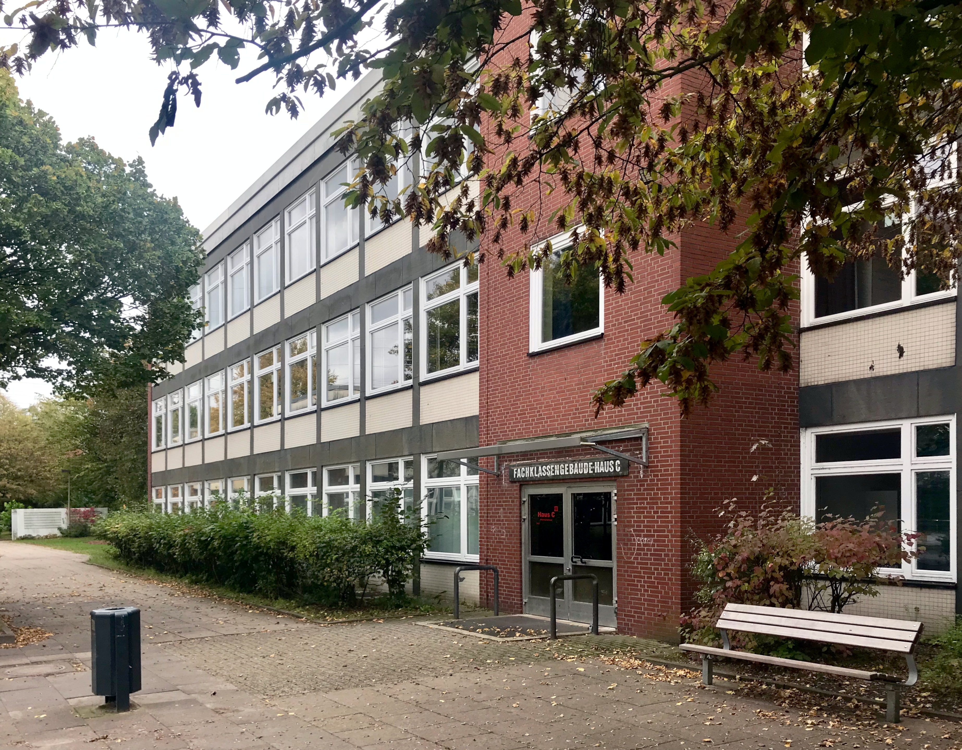 Gymnasium Marienthal in Hamburg, Haus C (Fachklassengebäude)